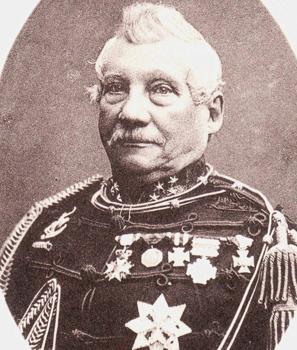 Jan van Swieten